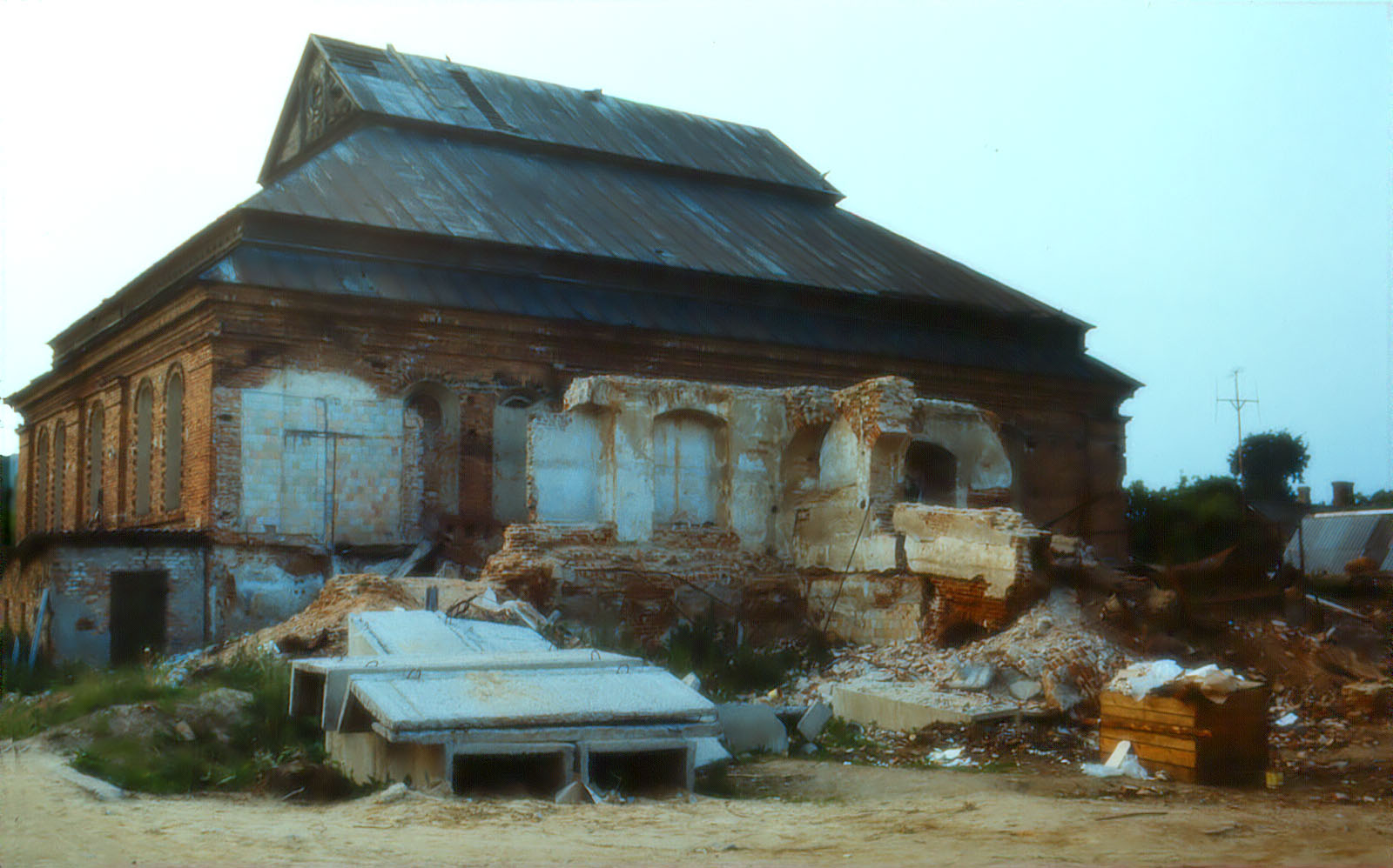 Synagogue in Ashmiany